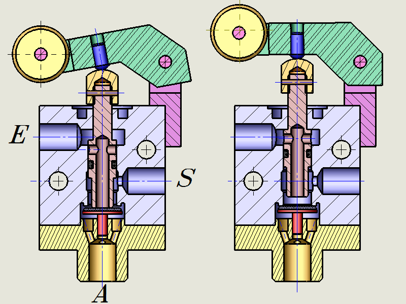 detail du fonctionnement d'un capteur pneumatique